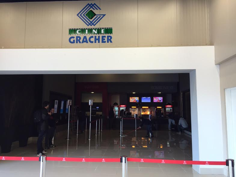 Área externa do Cine Gracher da loja Havan de Porto União